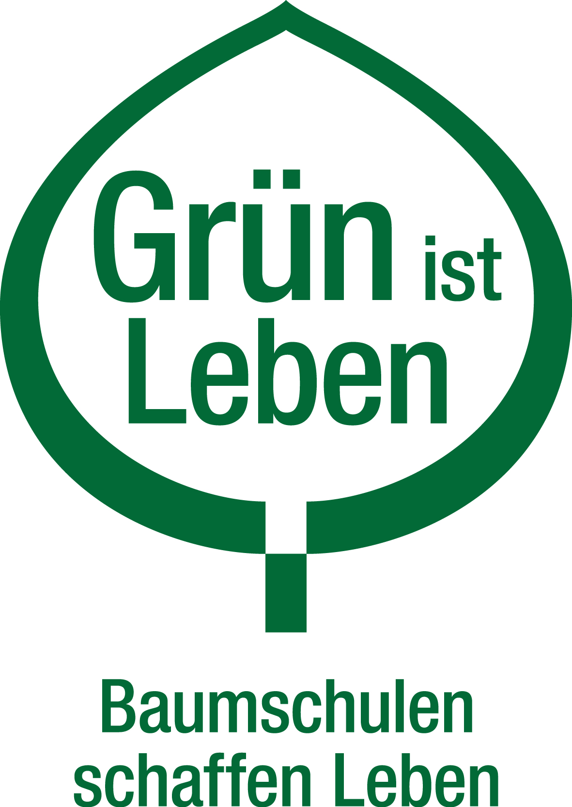 Offizielles "Grün ist Leben"-Logo